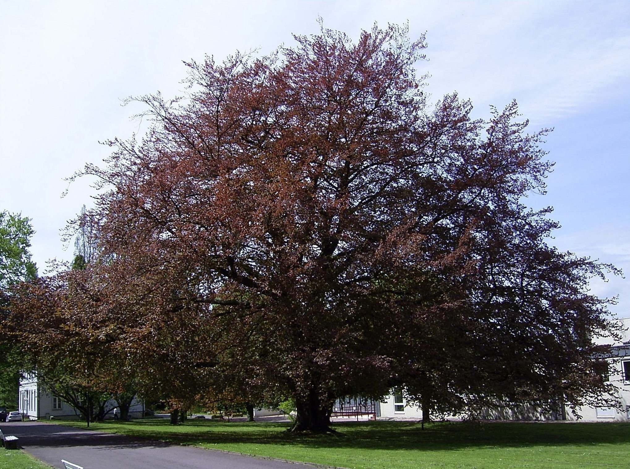 Fagus sylvatica 'Purpurea' in Bad Nenndorf, Deutschland